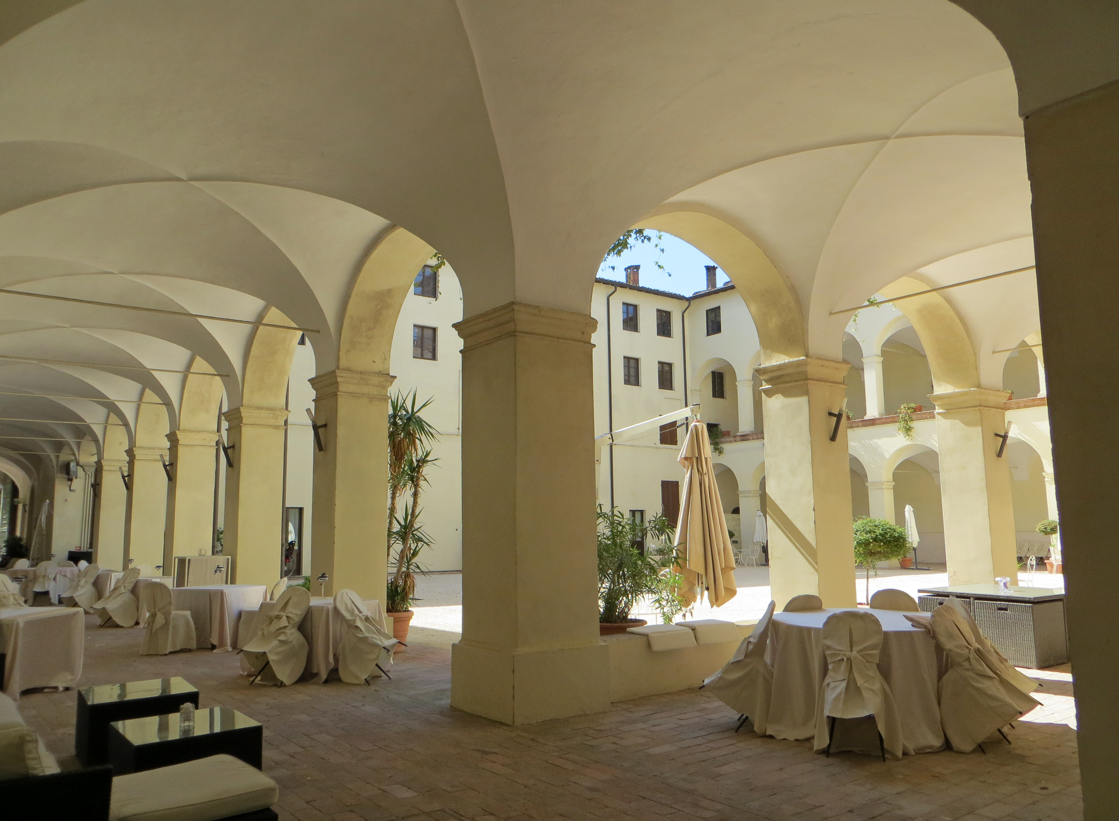 Abbazia di San Bernardo (Fontevivo) - porticato dei lati sud ed est